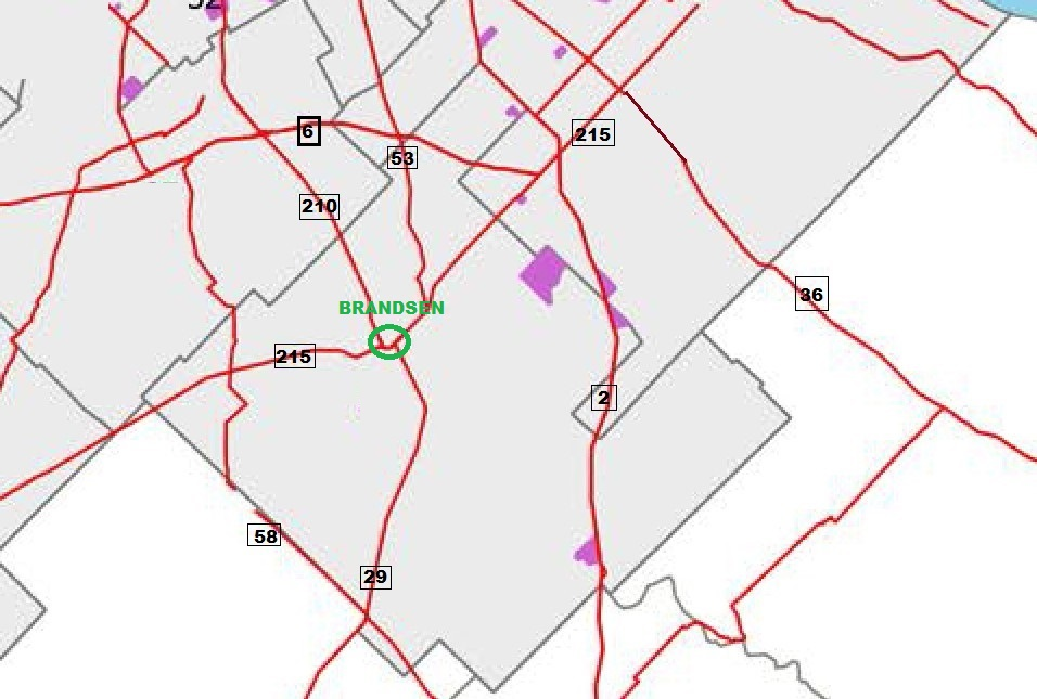 brandsen